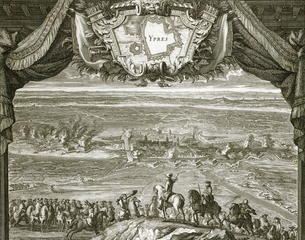 Représentation du siège d'Ypres en 1678.